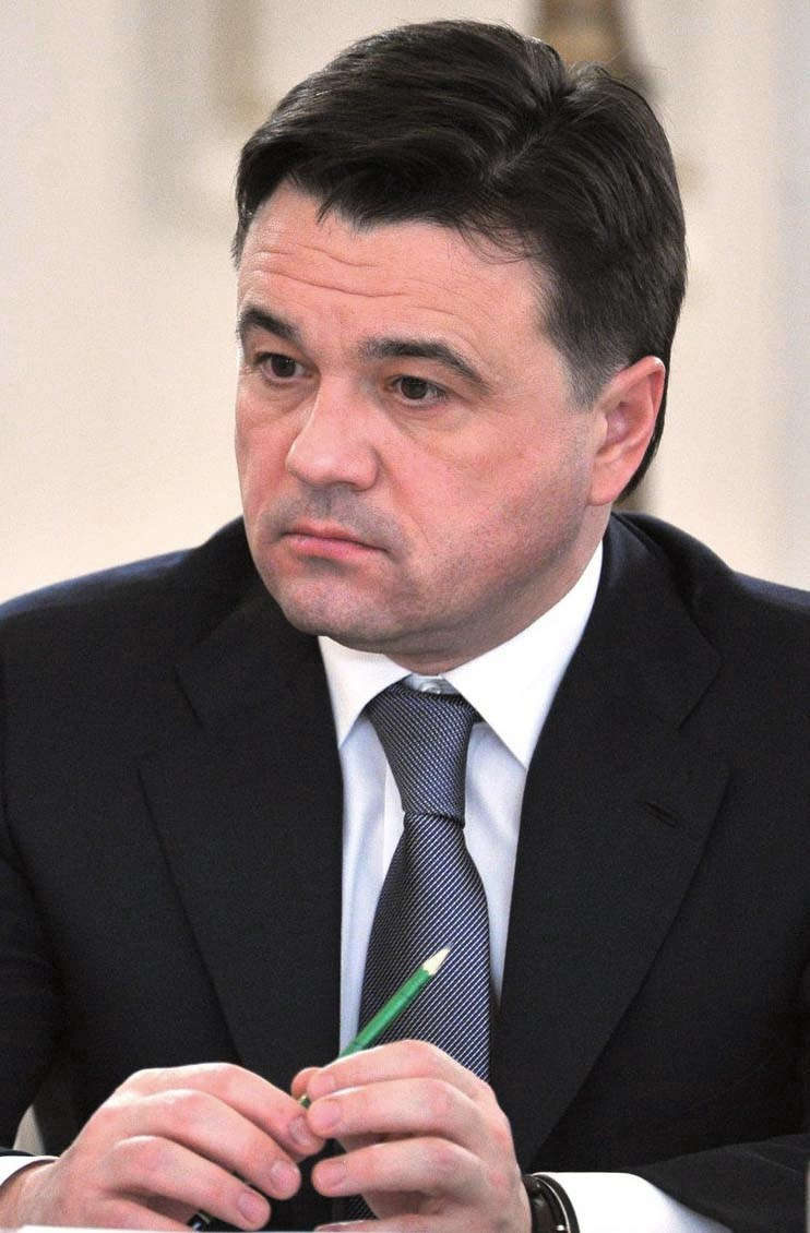 Губернатор Московской области Андрей Воробьёв на заседании Государственного совета по вопросам развития малого и среднего бизнеса